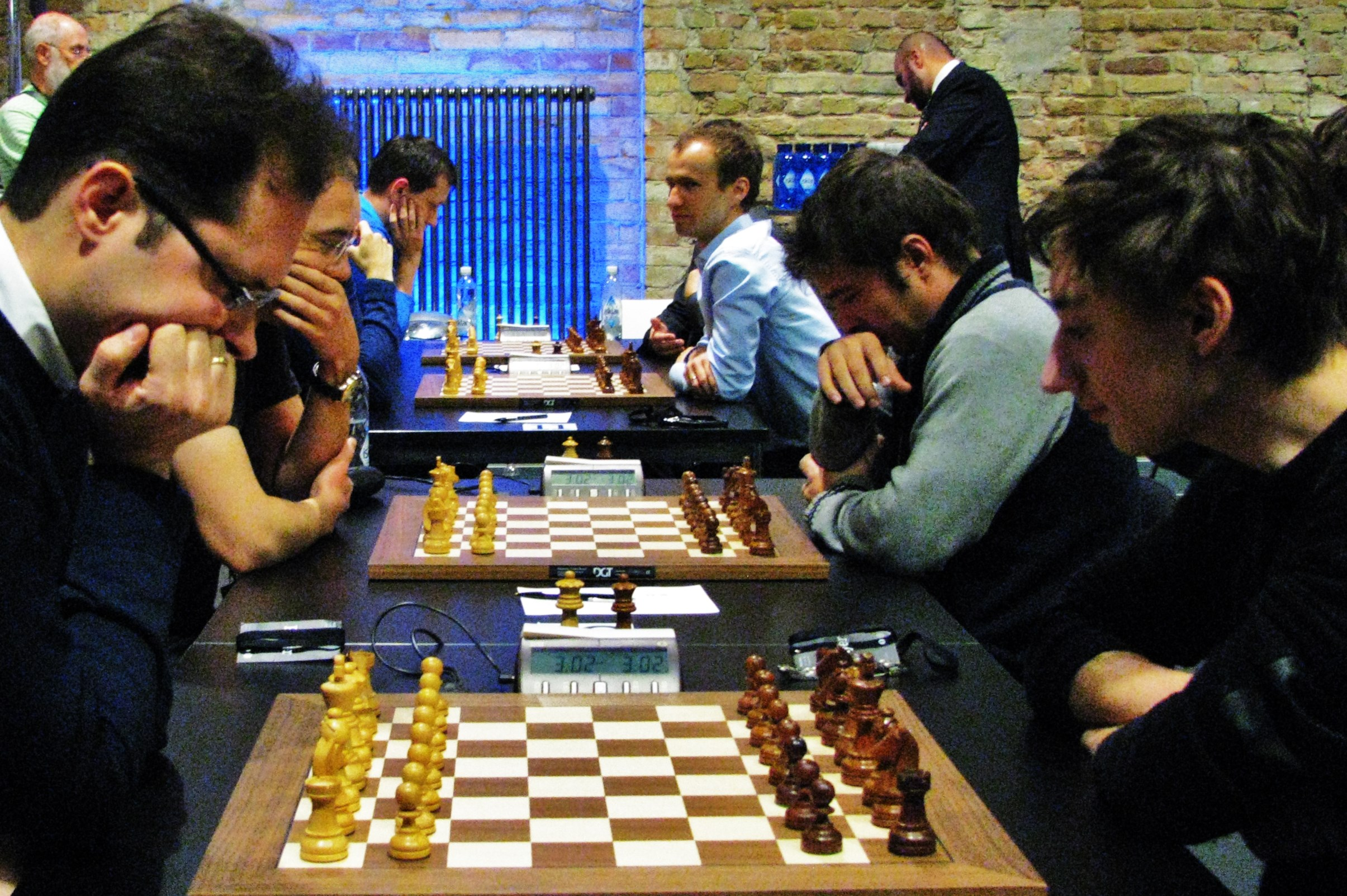 Péter Lékó (li.) und Daniil Dubov (re.) bei der Blitzschach-WM 2015 in Berlin